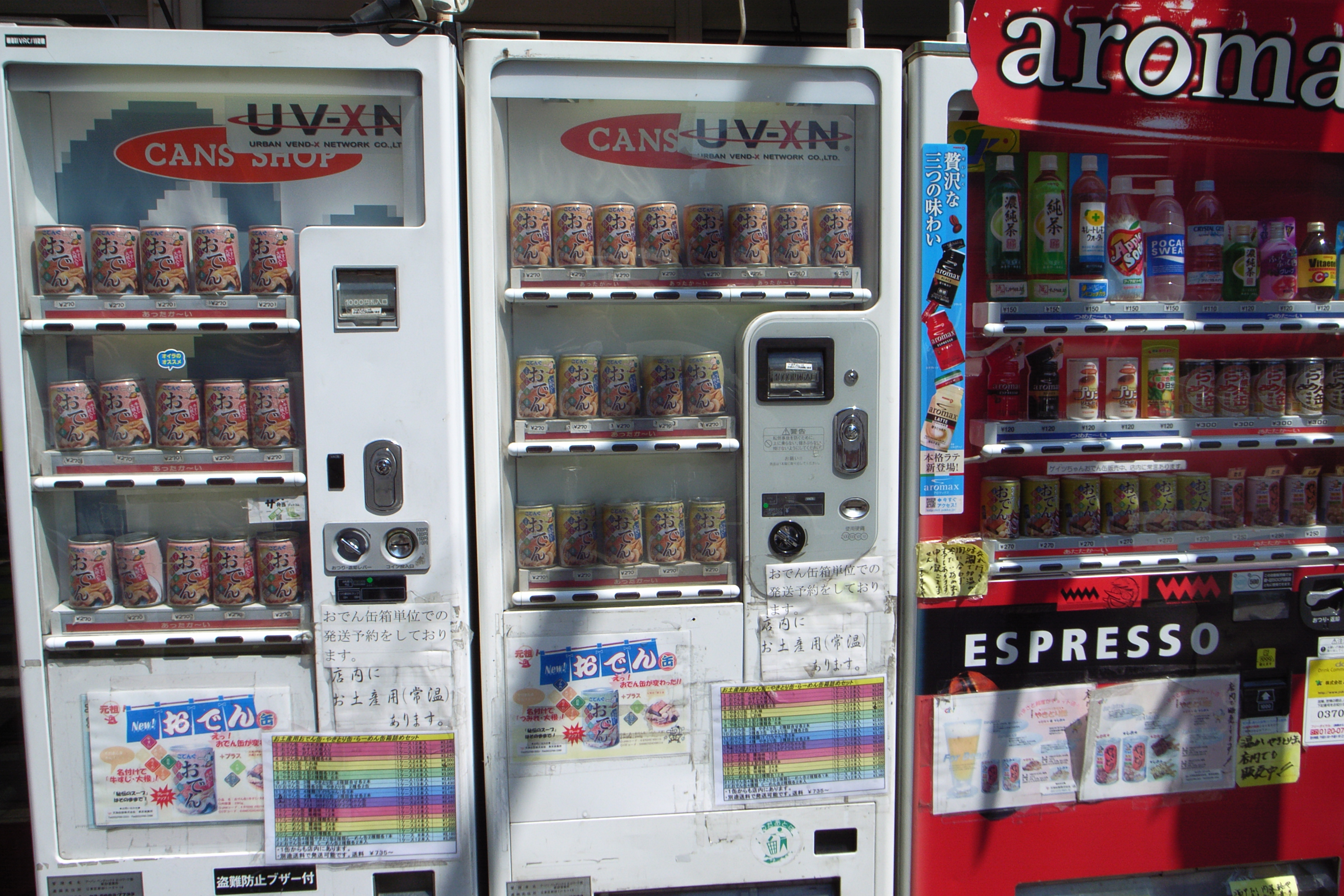 Canned oden vending machine